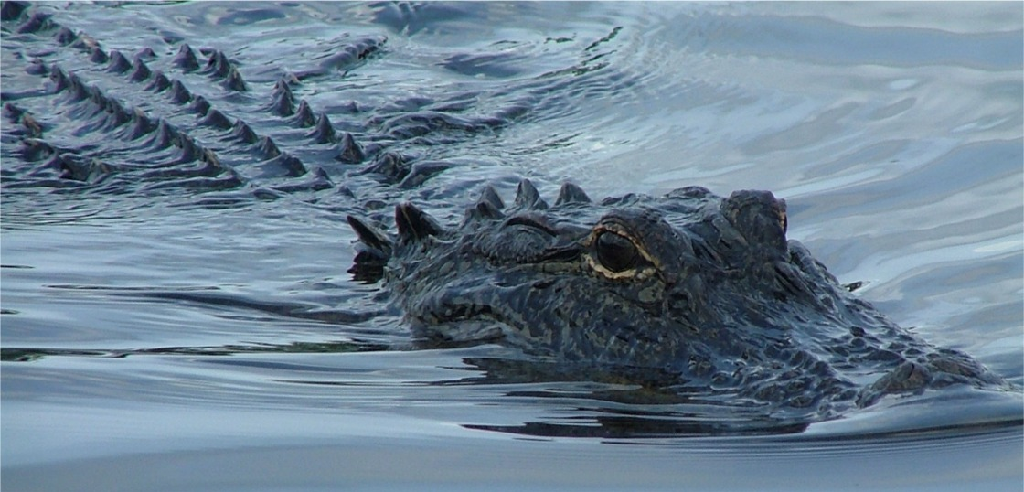 Alligator mississippiensis, close up